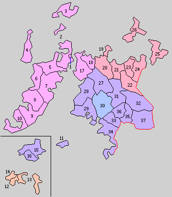 長崎県北松浦郡の町村制時点の町村。